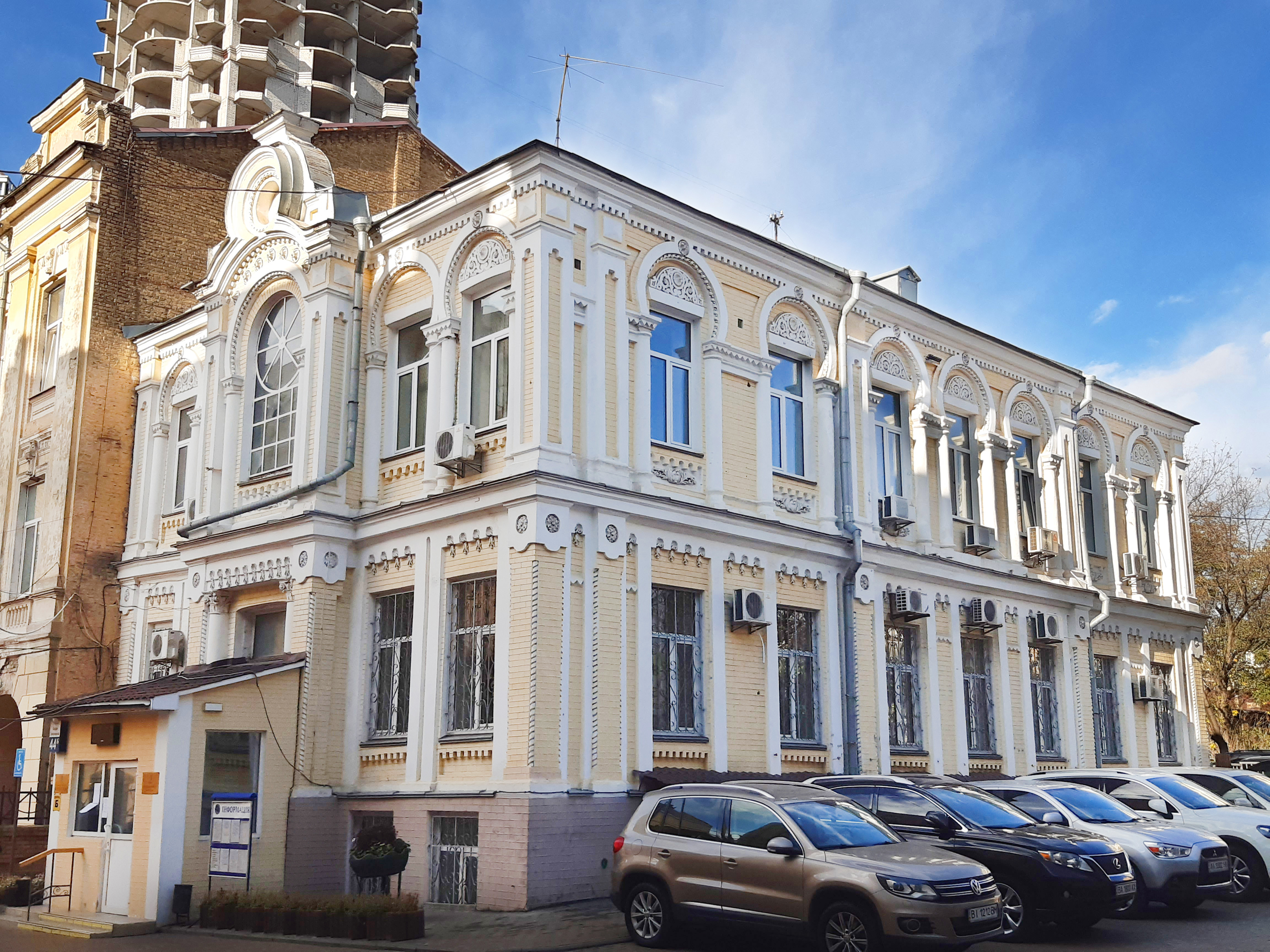 Флігель, Садиба Шампаньєра, Київ, вул. Богдана Хмельницького, 44-Б